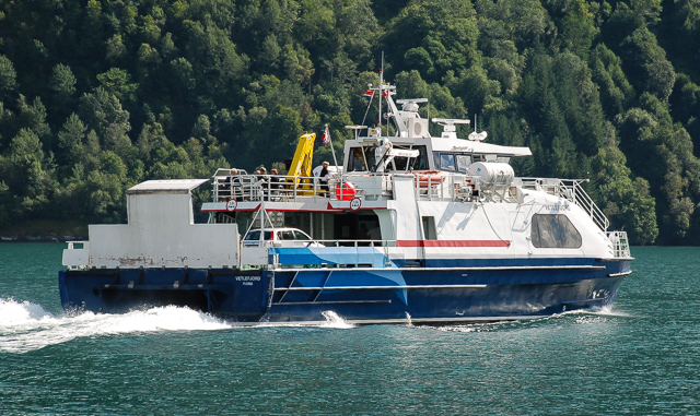 Vetlefjord på veg frå Fjærland.